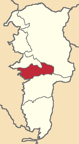 Mapa localizacor del cantón en Bolívar, Ecuador